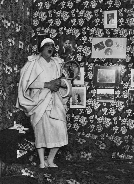 Saint Granier dans le rôle de Melle Lenglen au Casino de Paris : photographie de presse